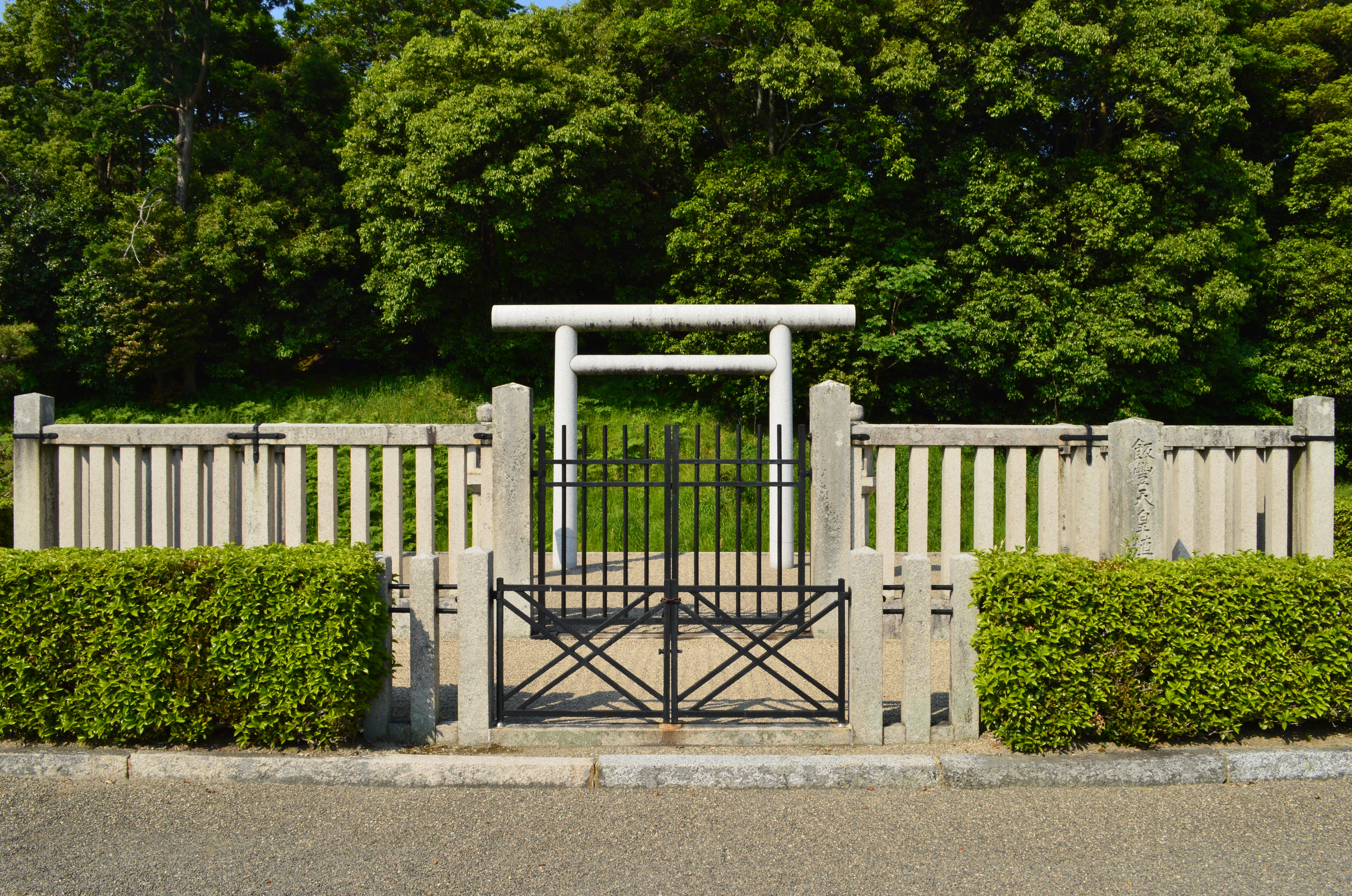 飯豊天皇埴口丘陵 拝所